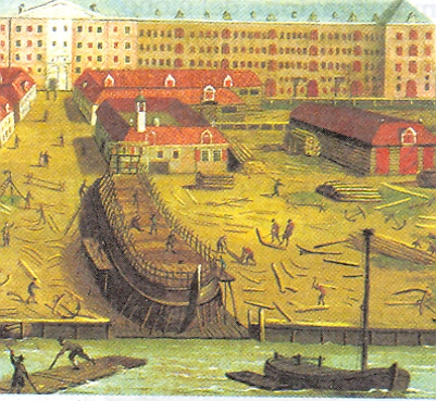 making an old ship